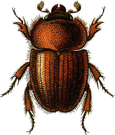 This file has been extracted from another file: Jacobs26.jpg